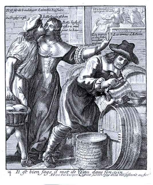 Le mari cocu met de l'eau dans son vin Gravure de Jacques Laignet vers 1660